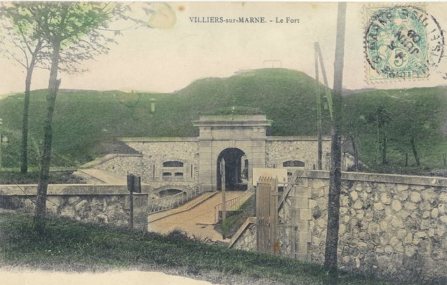 Carte postale du fort de Villiers (système Séré de Rivières, 1874) situé à l'époque dans le département de Seine et Oise, aujourd'hui sur la Commune de Noisy-le-Grand, quartier du Montfort, en Seine Saint-Denis. Pour en savoir plus